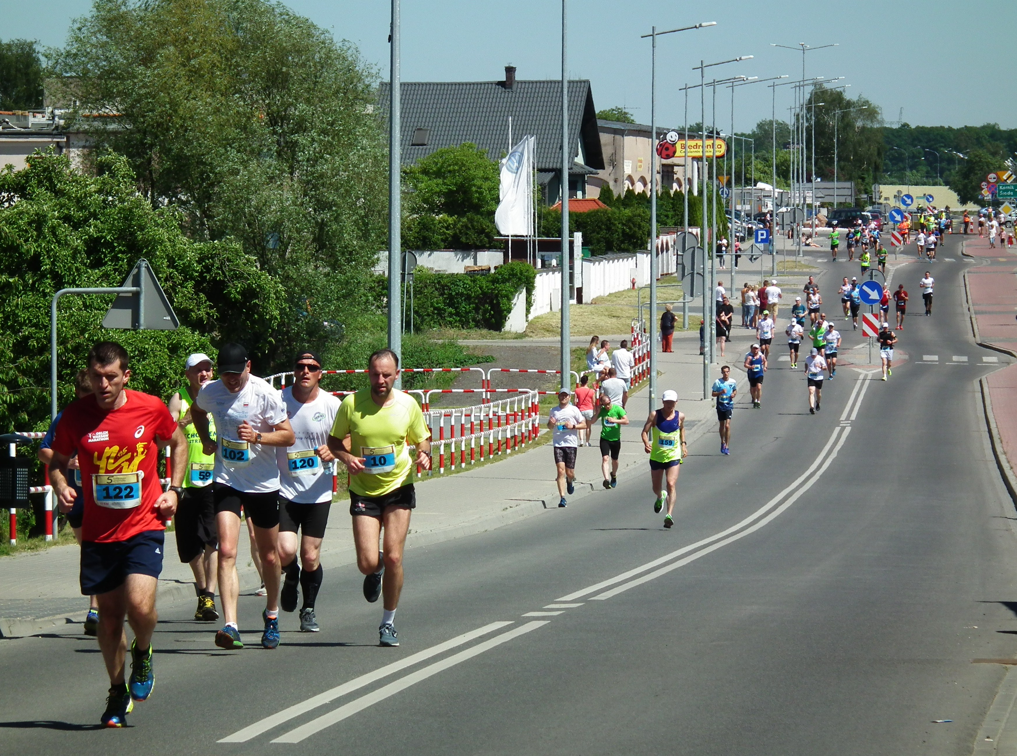 Bieg 5. Kurdeszowa (Za)Dyszka w Kostrzyniu Wlkp. 28.5.2017r.